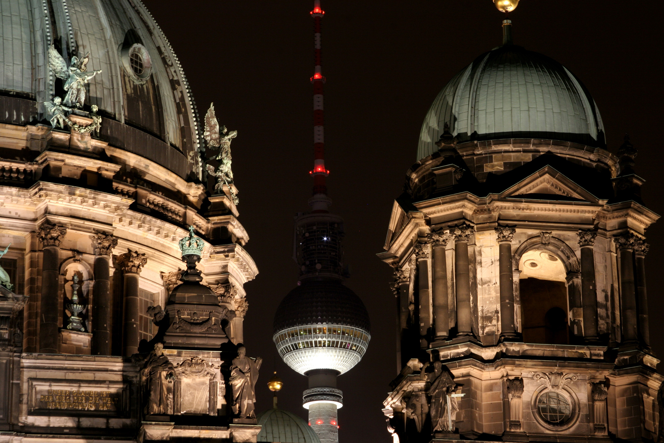 Berliner Dom und Fernsehturm